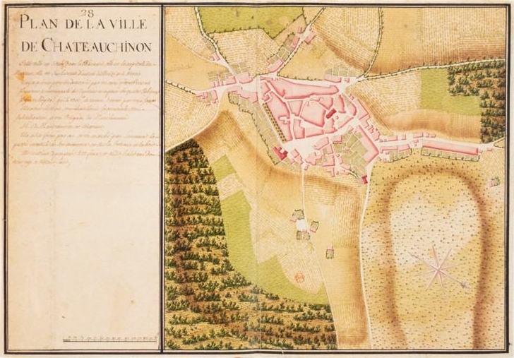 Plan de Château-Chinon au XVIIIe siècle. «Plan à la plume et encre de Chine, aquarelle ; 31,9 x 45,9 cm»